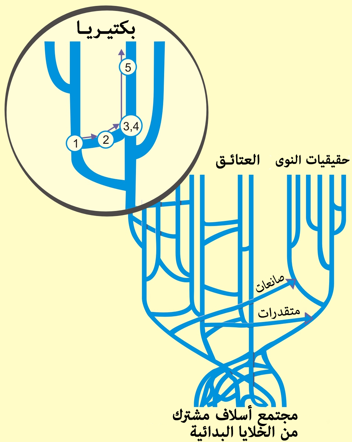 شجرة الحياة، تظهر نقل الجينات الأفقي والعمودي وتطور الجينات.